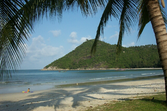 Ao Thong Nai Pan, Koh Phangan, Surat Thani, Thailand